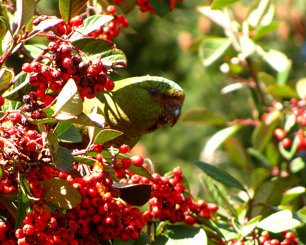 Isla Teja, U. Austral. Valdivia